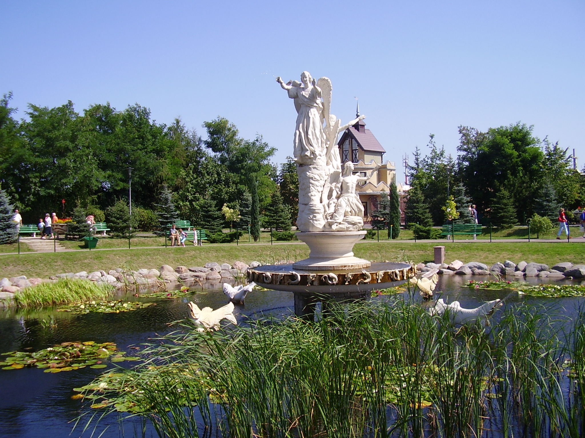 Fontanna w Licheniu (15.08.2005)